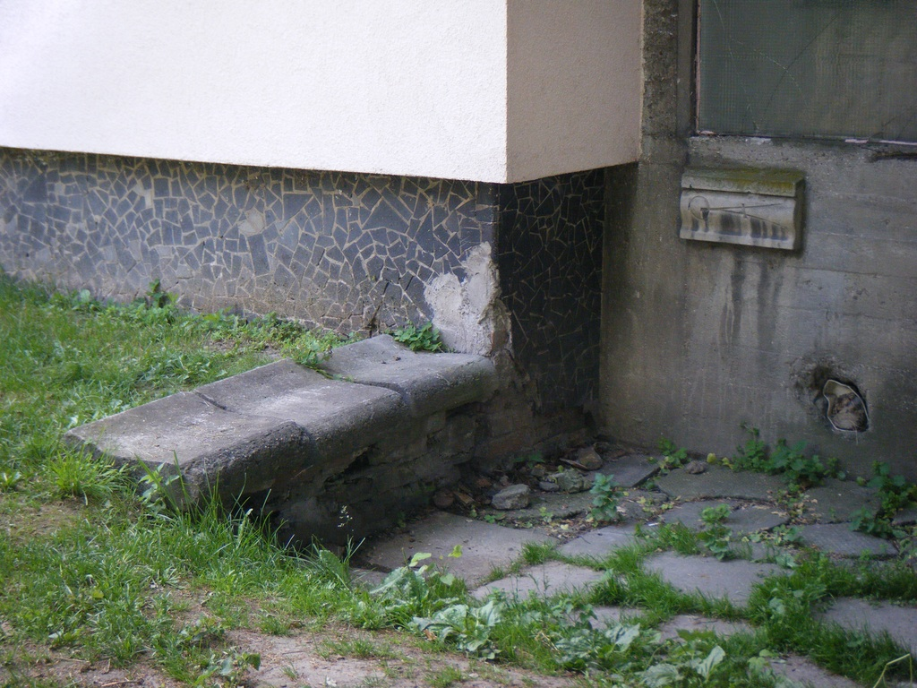 Betonowe resztki ławki i gmerk Biura Odbudowy Stolicy - ul. Katowickiej 7A w Warszawie.